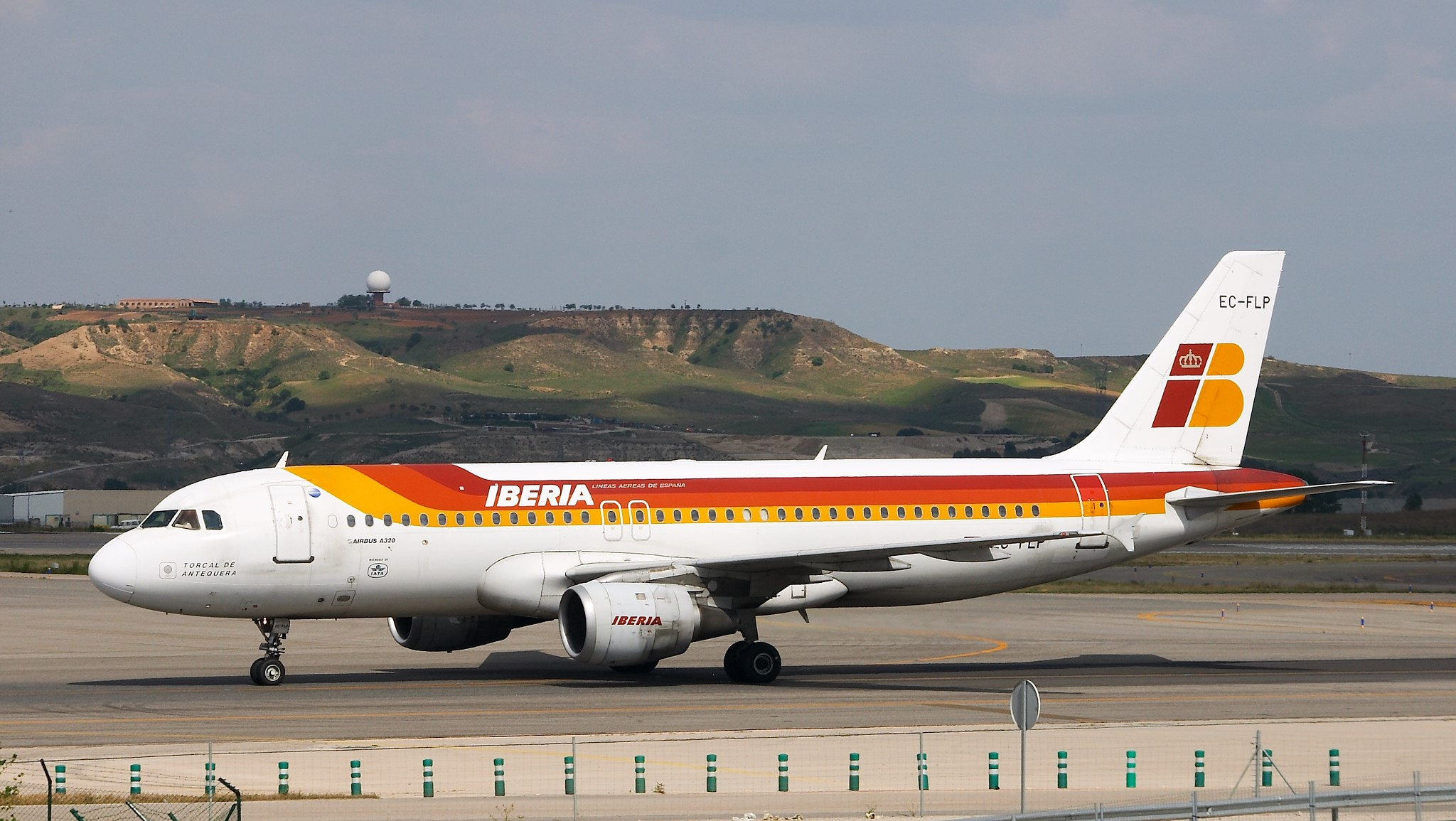 Airbus A320-211 dirigiéndose hacia la T4. Aeropuerto de Madrid Barajas.